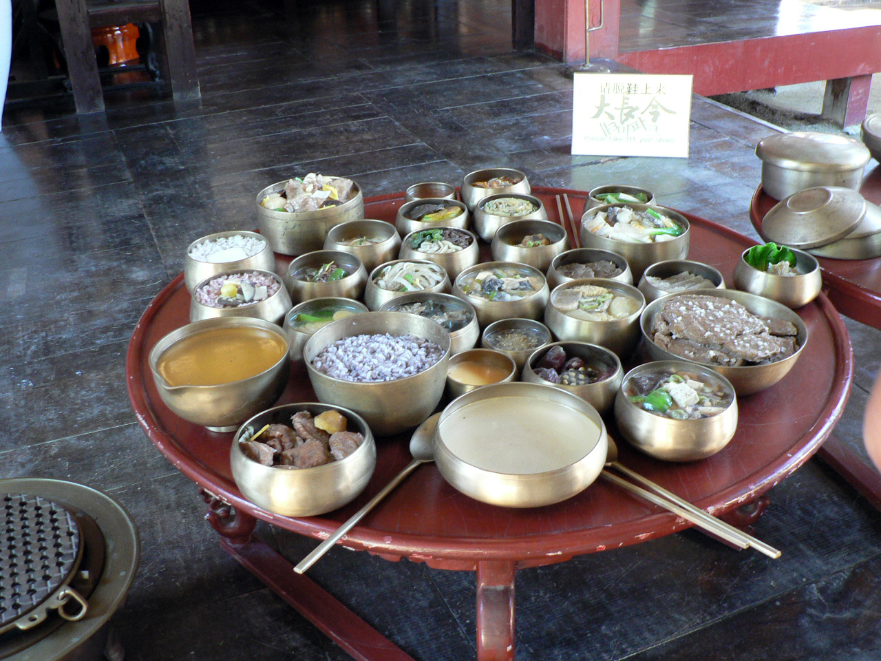 Dae Jang Geum Theme Park